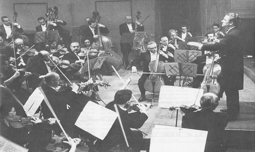 Celibidache dirige l'Orchestra Sinfonica Siciliana ora FOSS